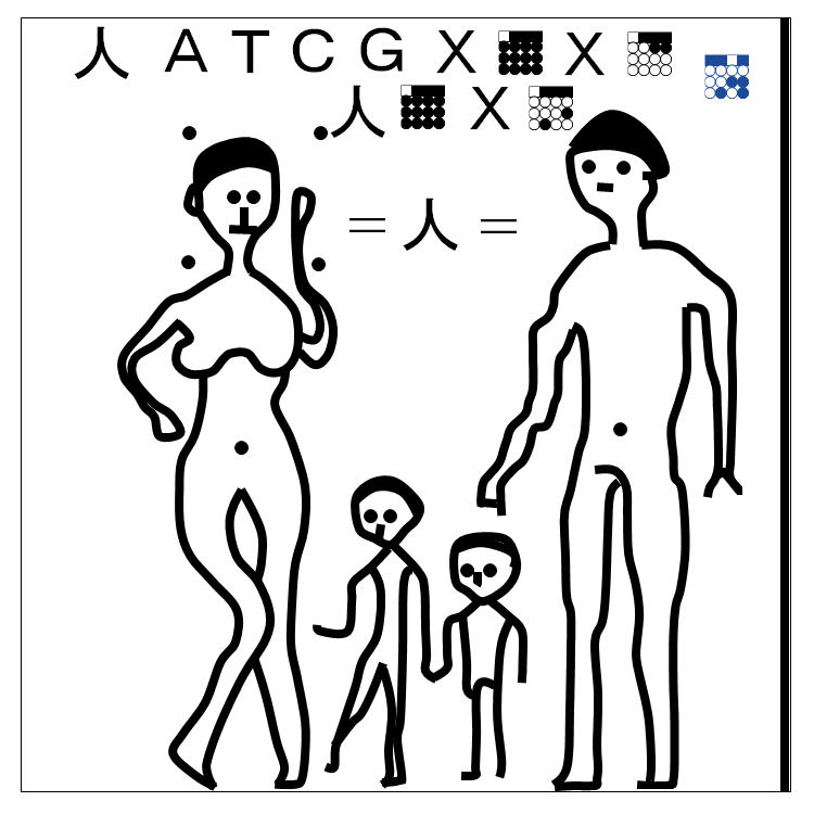 1983年に森本雅樹、平林久によってわし座アルタイルへ電波望遠鏡により送信されたメッセージの説明図。オリジナルは71ビット四方のビットマップ画像。